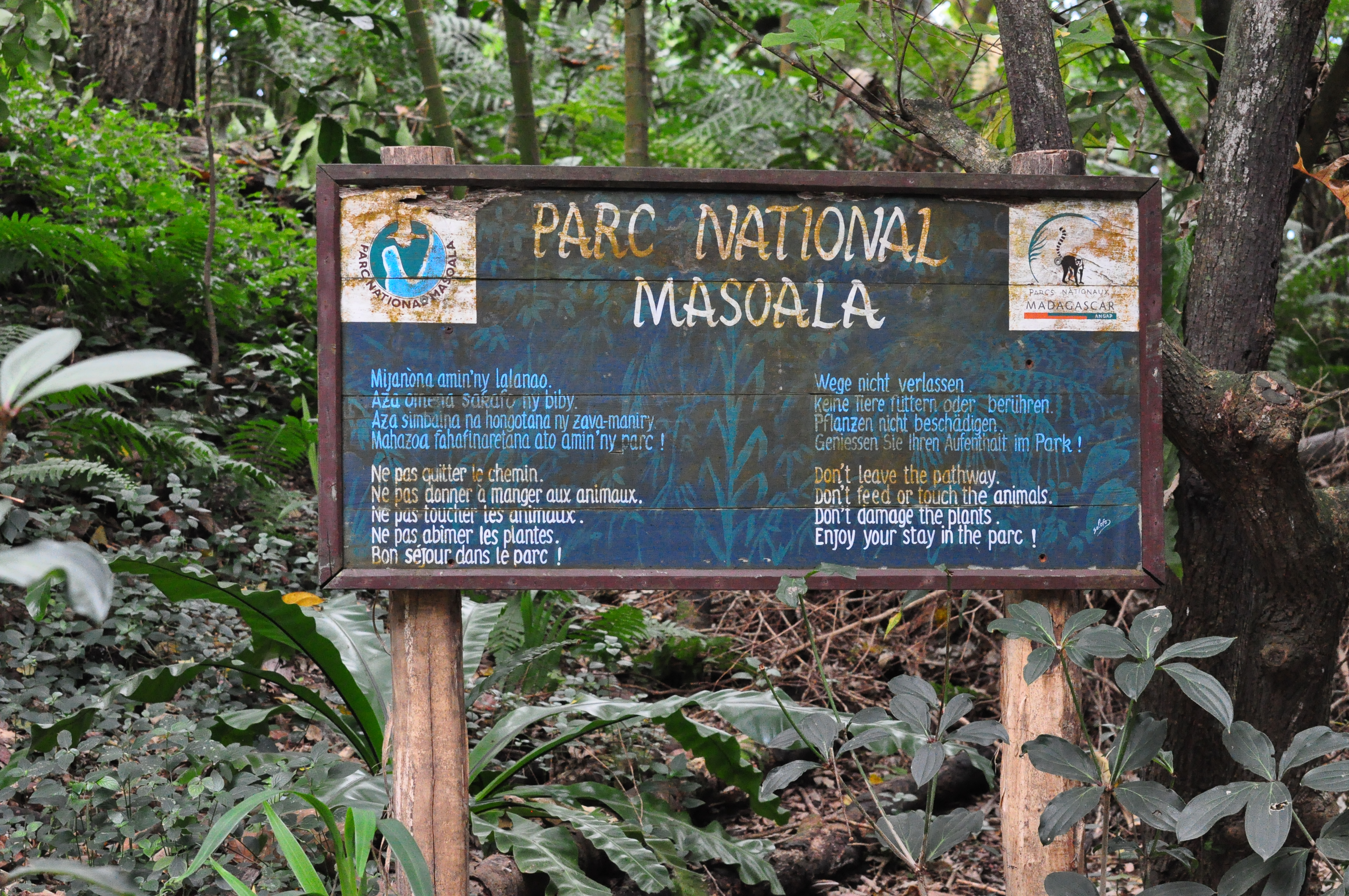 Masoala, Zoo Zürich (Switzerland)